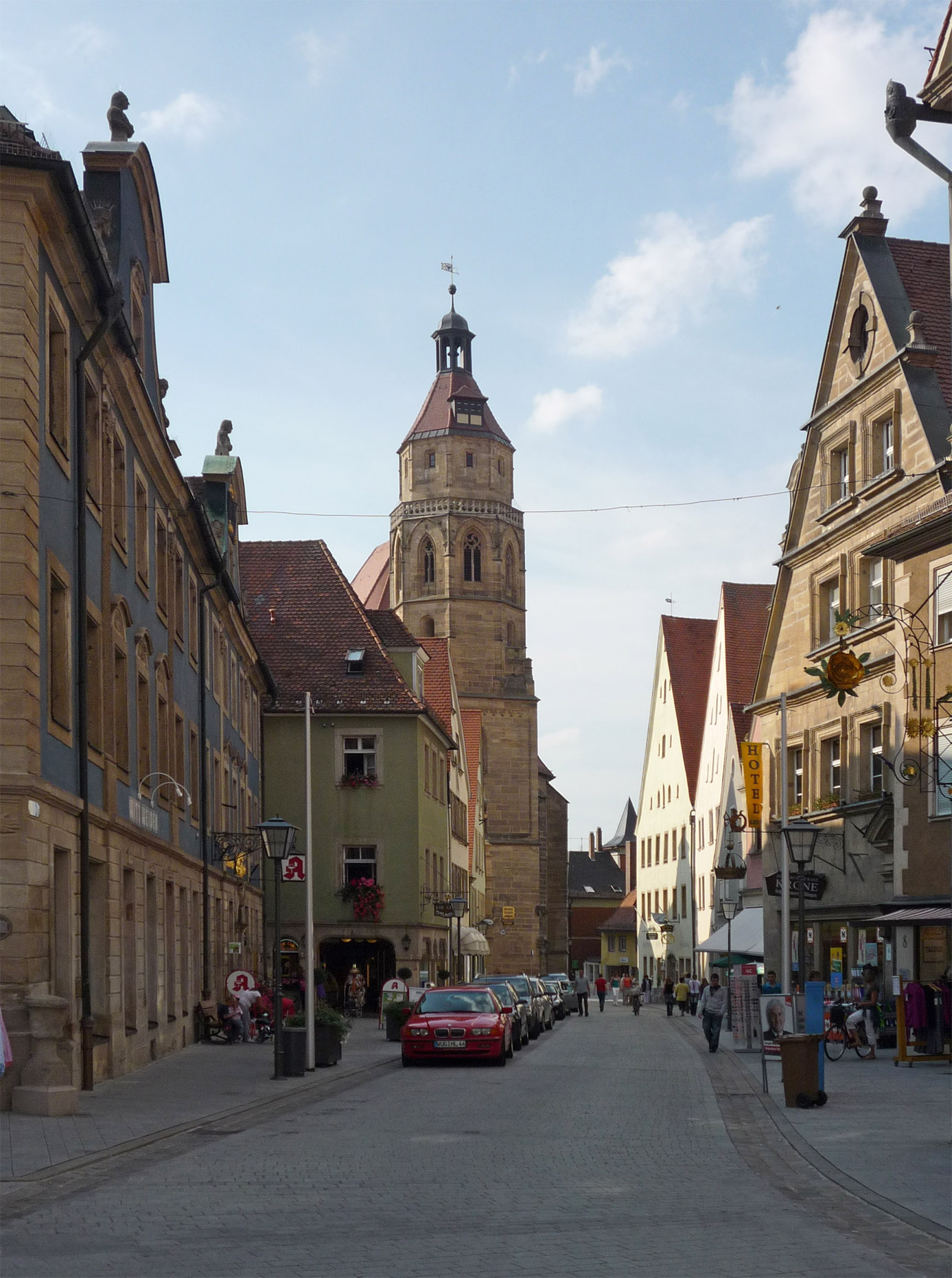 St. Andreaskirche in Weißenburg